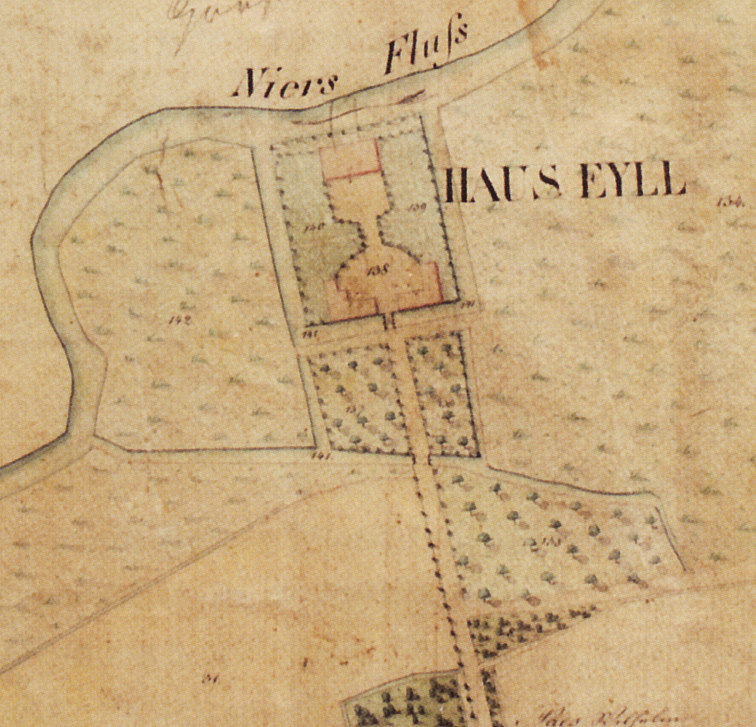 Abbildung des Hauses Eyll in Straelen auf einer Karte aus dem Jahr 1831